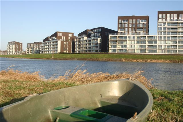 Eigen Makelij 2007. Bij gebruik, bron (Wikipedia) en fotograaf (T.C. Nijeholt) vermelden.